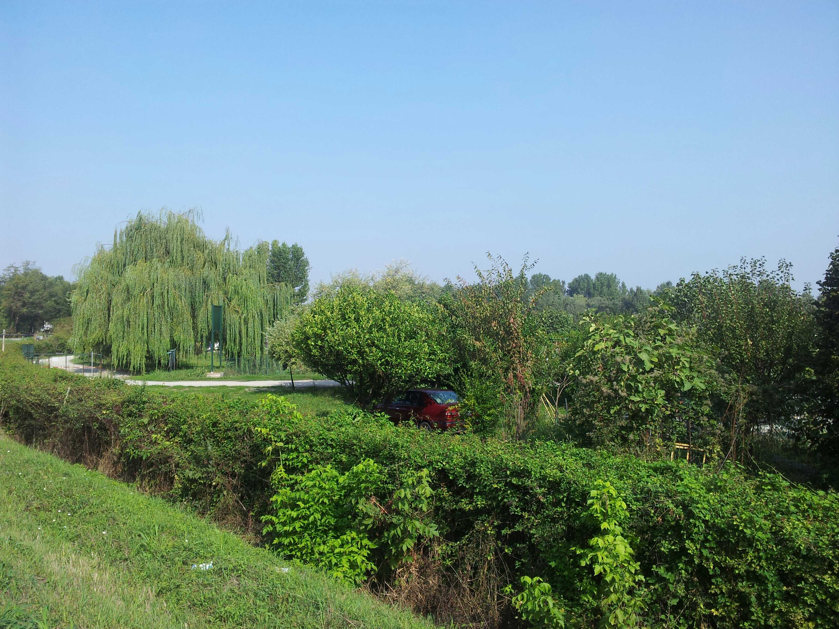 Levadina This is a photo of a monument which is part of cultural heritage of Italy. The authorisation for taking photos of this object was provided by the World Wide Fund for Nature Italy.